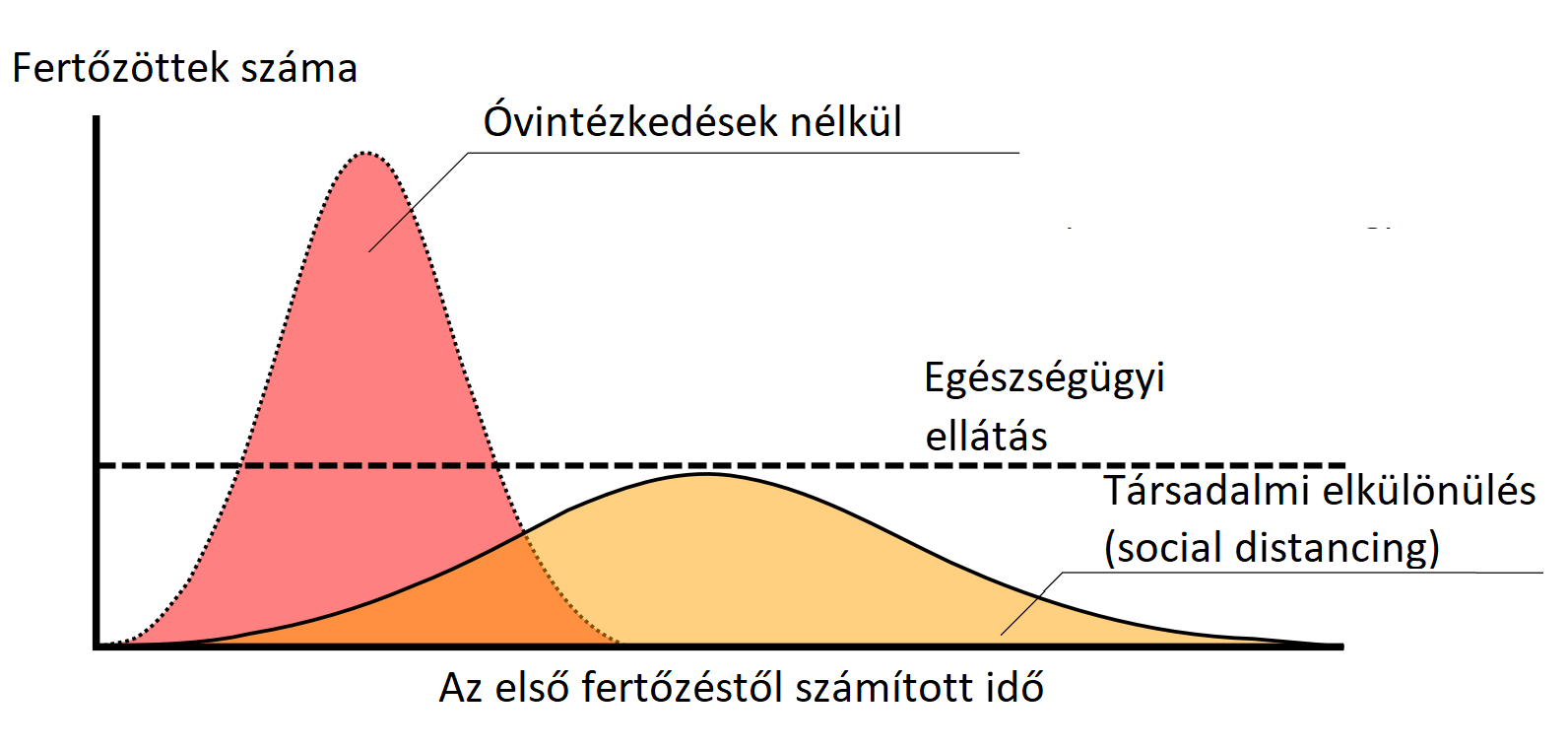 A szociális izolációnak (social distancing) vagy társadalmi elkülönülésnek nevezett közegészségügyi és járványügyi stratégia hatása egy pandémia esetében, a lakosság egymás közötti érintkezésének csökkentésével